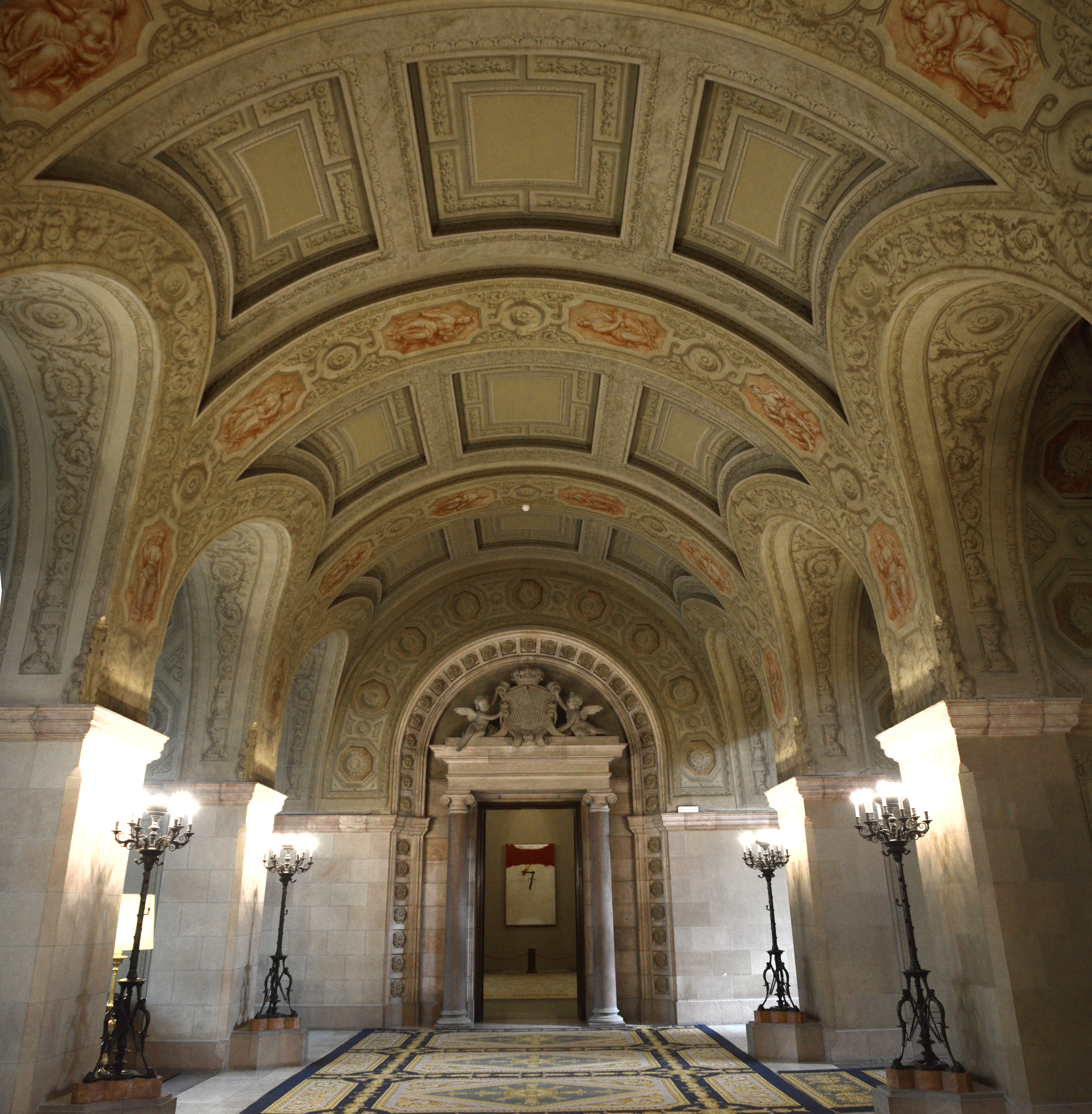 Salón de los candelabros